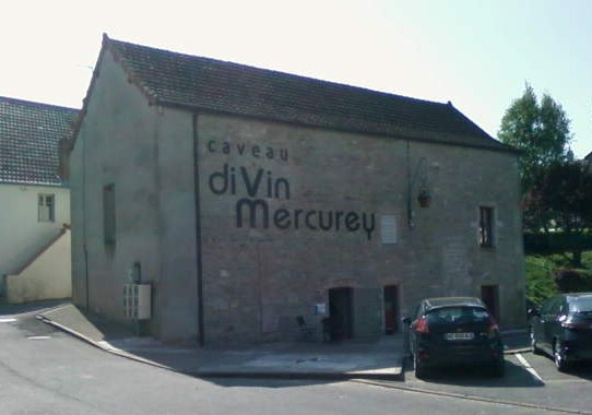 Vue du Caveau Divin à Mercurey (71)